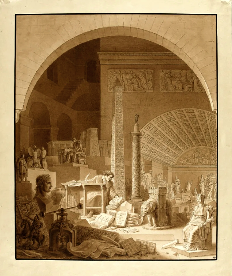 Vivan Denon travaillant dans la salle de Diane au Louvre - Benjamin Zix (1811)